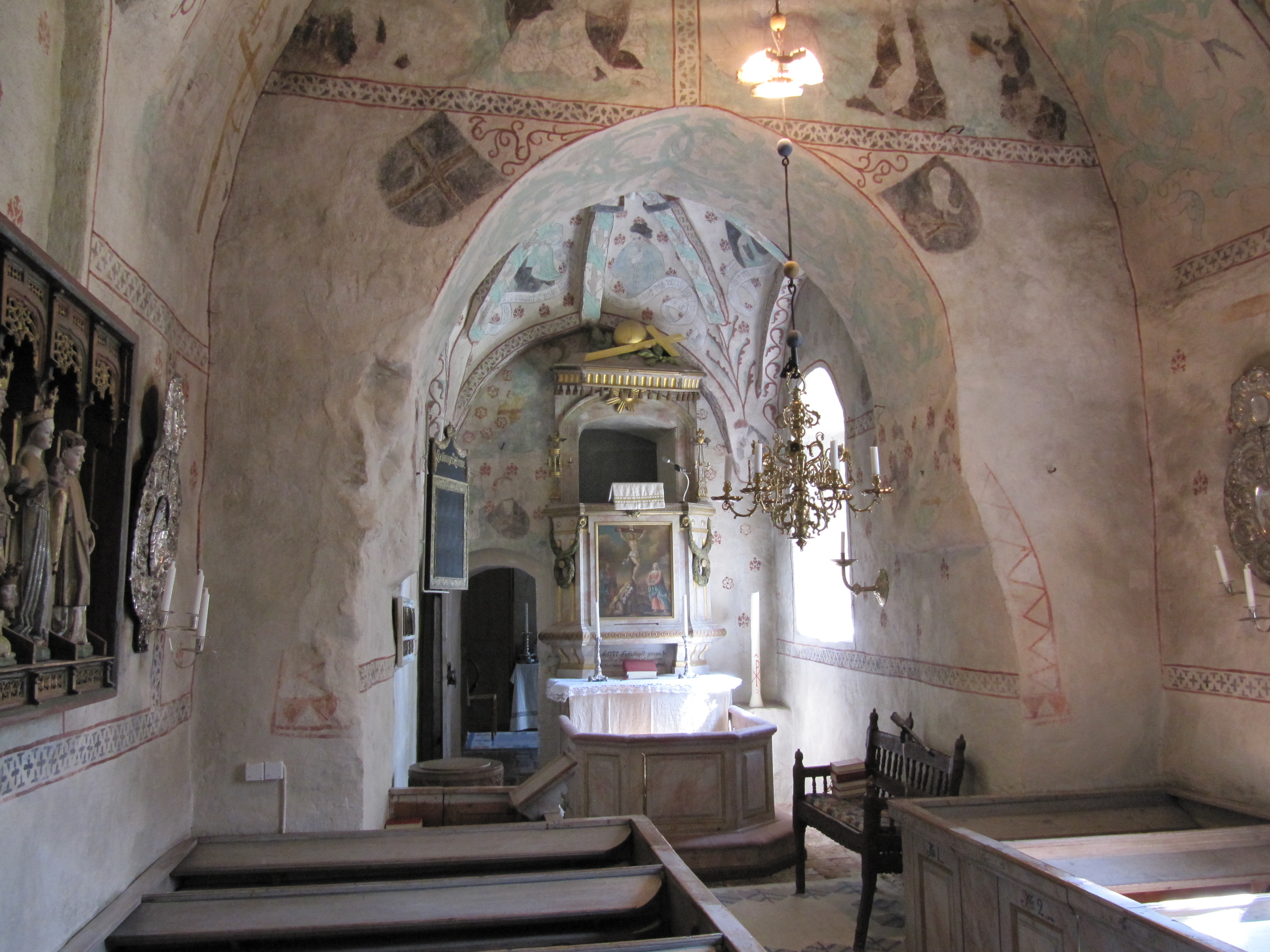 Kyrkorum i Yttergrans kyrka